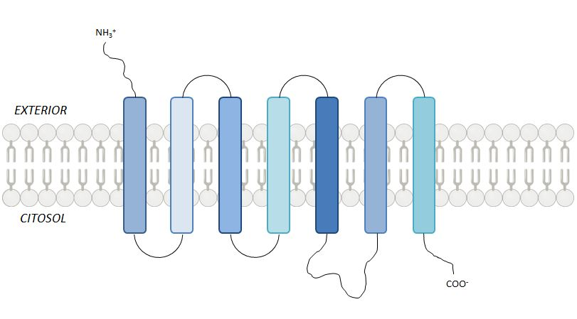 Estructura general i simplificada dels GPCRs, amb un extrem amino extracel·lar, 7 hèlixs transmembrana i un extrem carboxil intracel·lular.